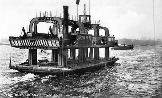 Wagenveer in Rotterdam. Foto van prentbriefkaart uit de jaren twintig, fotograaf onbekend.